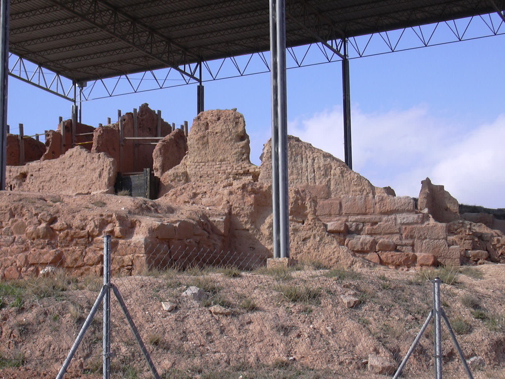 Excavación arqueológica de Contrebia Belaiska (Botorrita)